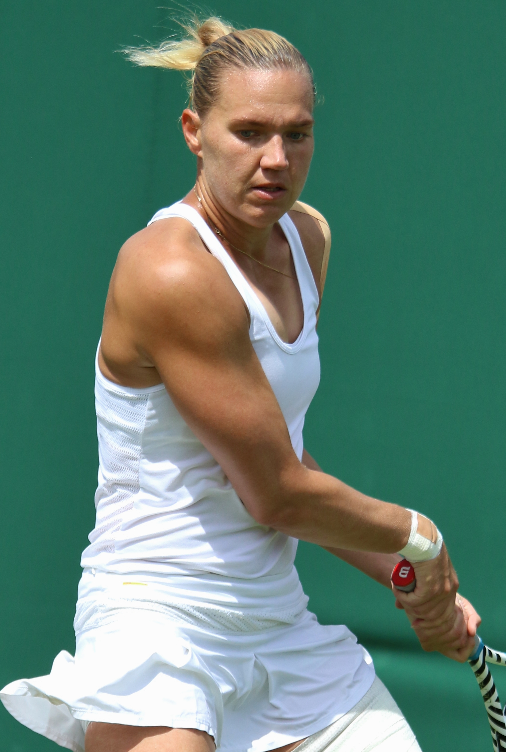 Kanepi WM19 (23)